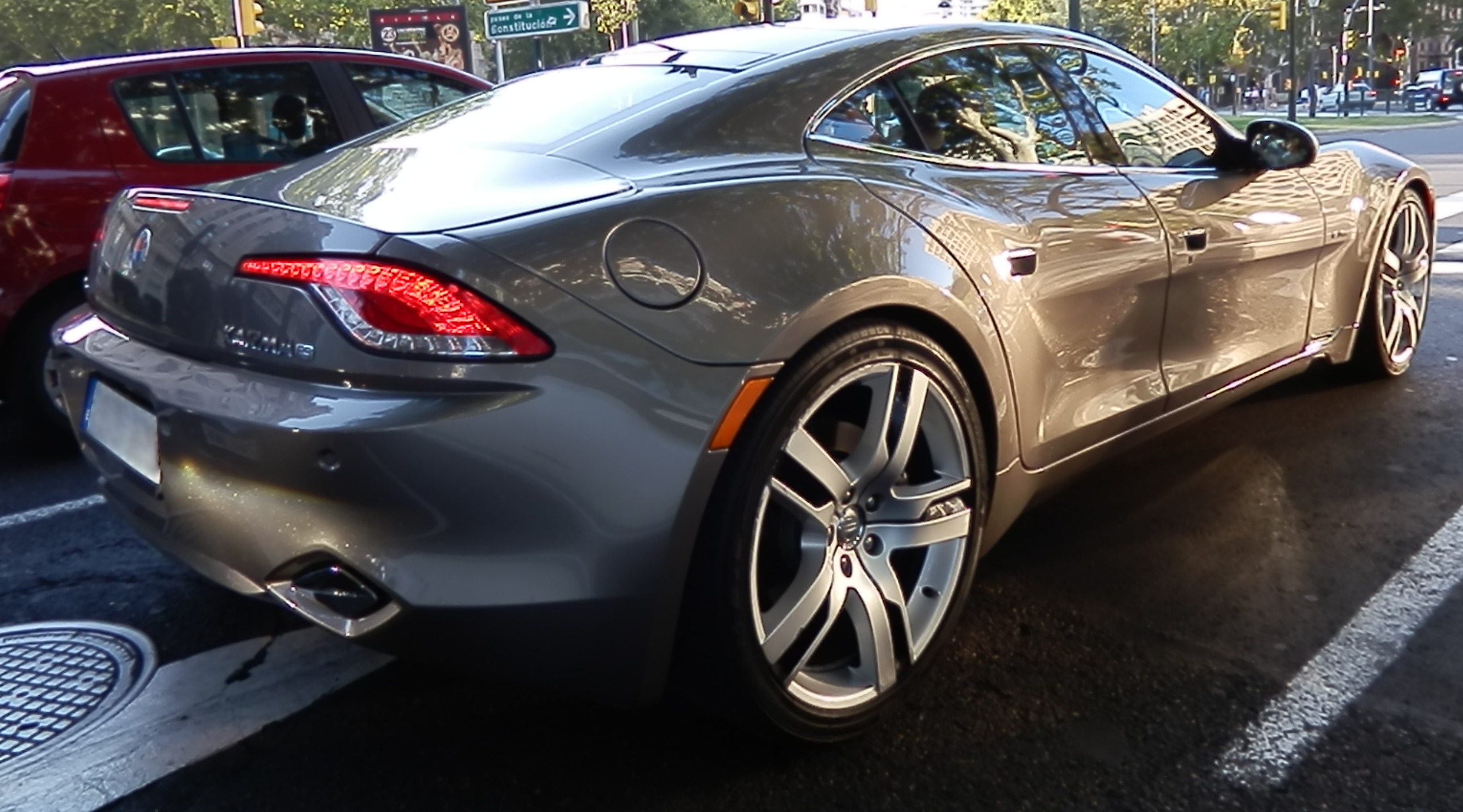 Fisker Karma fotografiado en España en agosto de 2014.